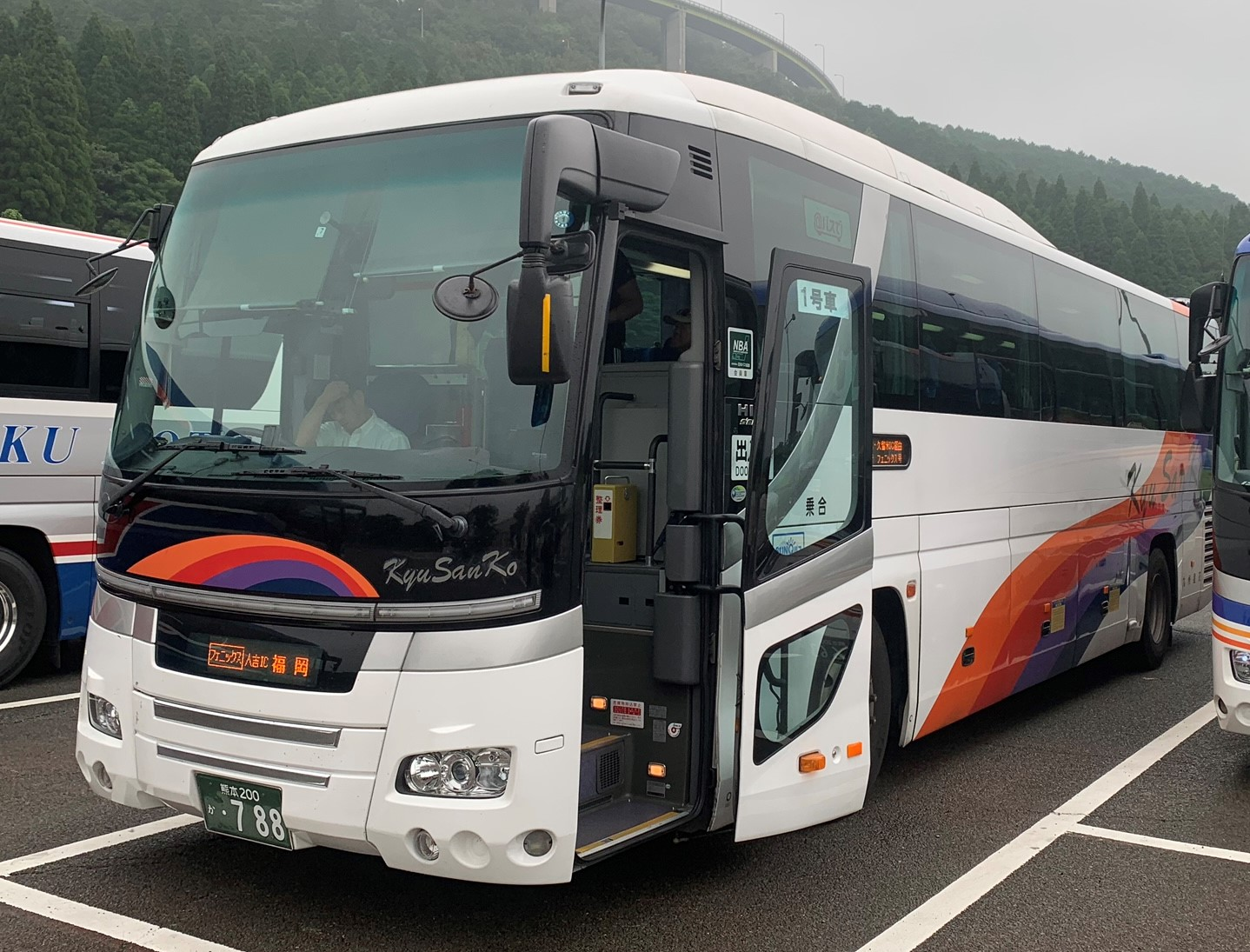 九州産交バス788 福岡宮崎線「フェニックス号」専用車 日野・セレガジェイバス車体 えびのパーキングエリアにて